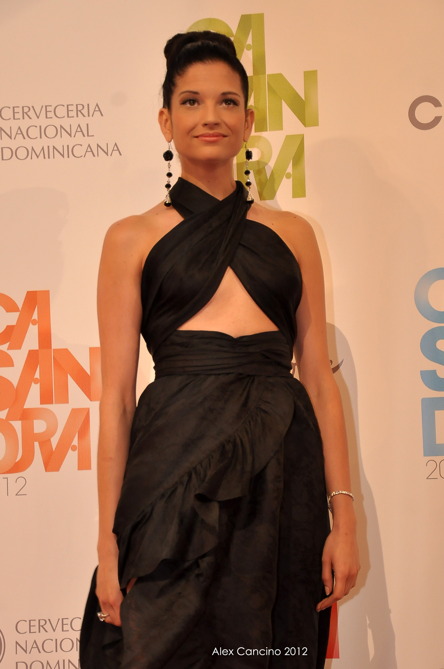 Natalia Jimenez, Alfombra Roja Premios Casandra 2012